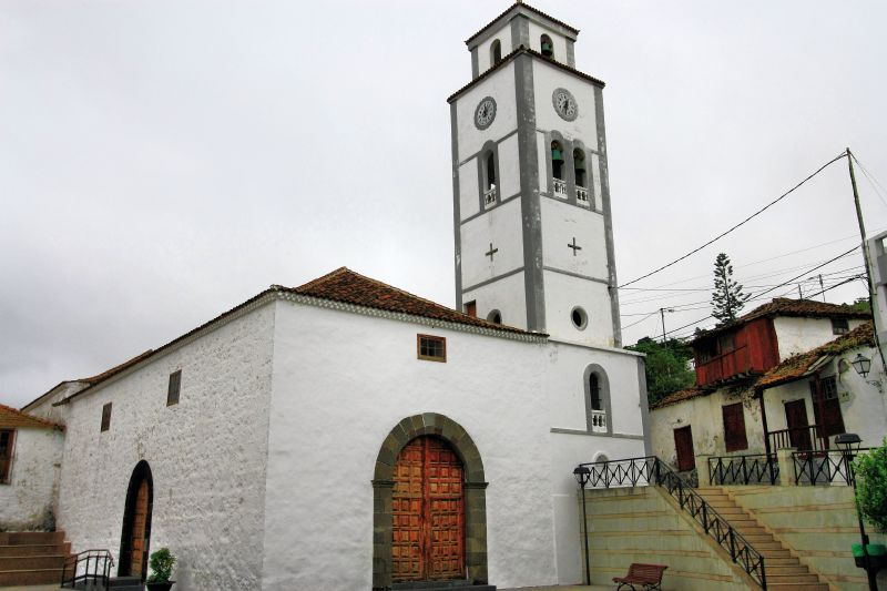 Iglesia de San Antonio de Padua. El Tanque (Tenerife)